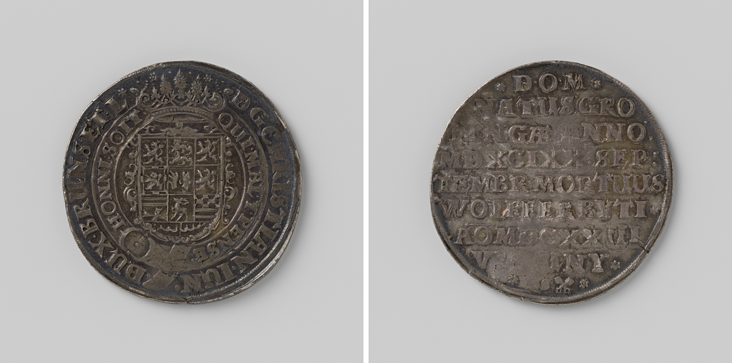 IdentificatieTitel(s): Overlijden van Christiaan Junius, hertog van BrunswijkObjecttype: historiepenning Objectnummer: NG-VG-1-668Omschrijving: Zilveren penning. Voorzijde: gekroond wapenschild, omhangen met orde van kouseband binnen omschrift. Keerzijde: opschriftVervaardigingVervaardiger: medailleur: Henning SchlüterPlaats vervaardiging: ZellerfeldDatering: 1626Materiaal: zilver Techniek: slaanAfmetingen: d 4,4 cm. × g 291 grOnderwerpWanneer: 1626-09-20 - 1626-09-20Wie: Christiaan Junius (hertog van Brunswijk)Verwerving en rechtenCredit line: Schenking van mevrouw J.M. van Gelder-NijhoffVerwerving: schenking 1885Copyright: Publiek domein